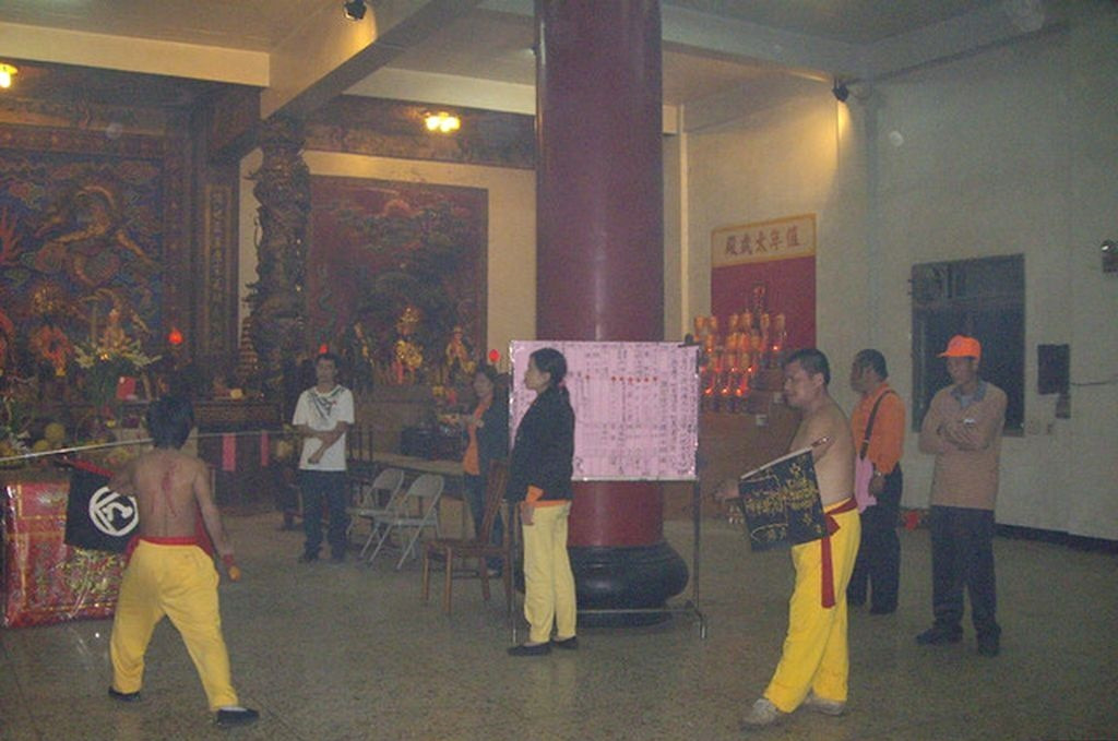 乩童—用長銅針來貫穿臉頰而封口（俗稱灌口針）儀式。